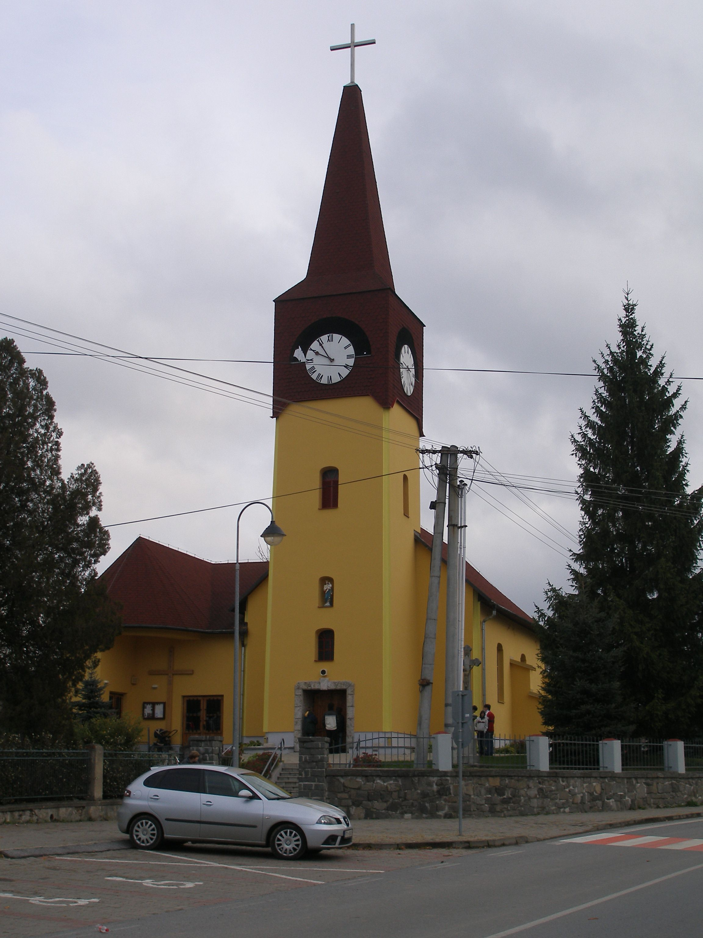 Kostol v obci Ľubotice bývalej mestskej časti Prešova